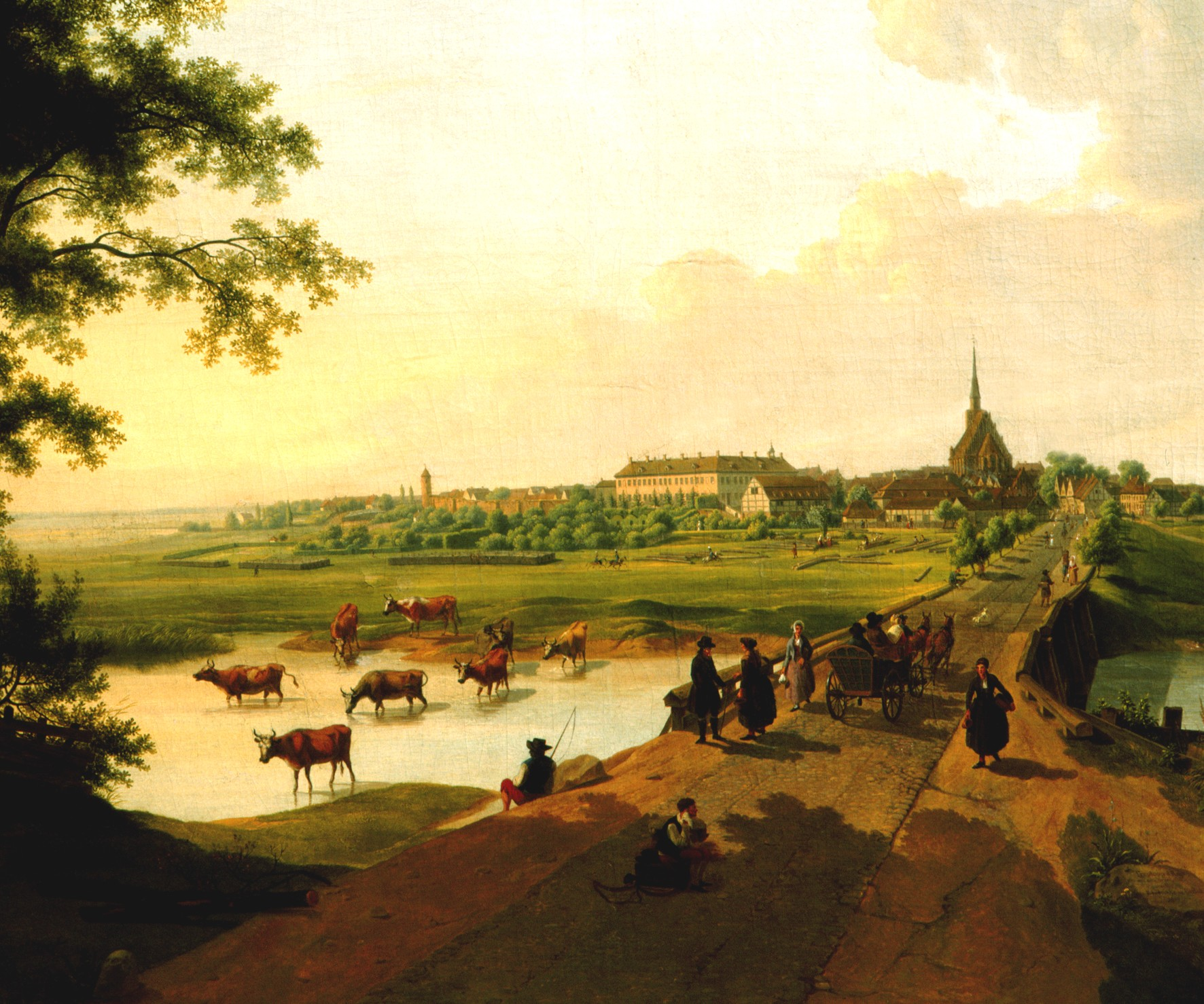 Obraz olejny autorstwa prof. Petera Ludwiga Lütkego ukazujący panoramę Trzebiatowa (od strony Przedmieście Kołobrzeskiego) z poczatków XIX wieku